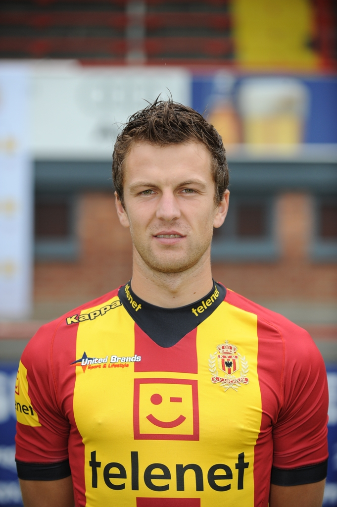 Belgisch voetballer, verdediger